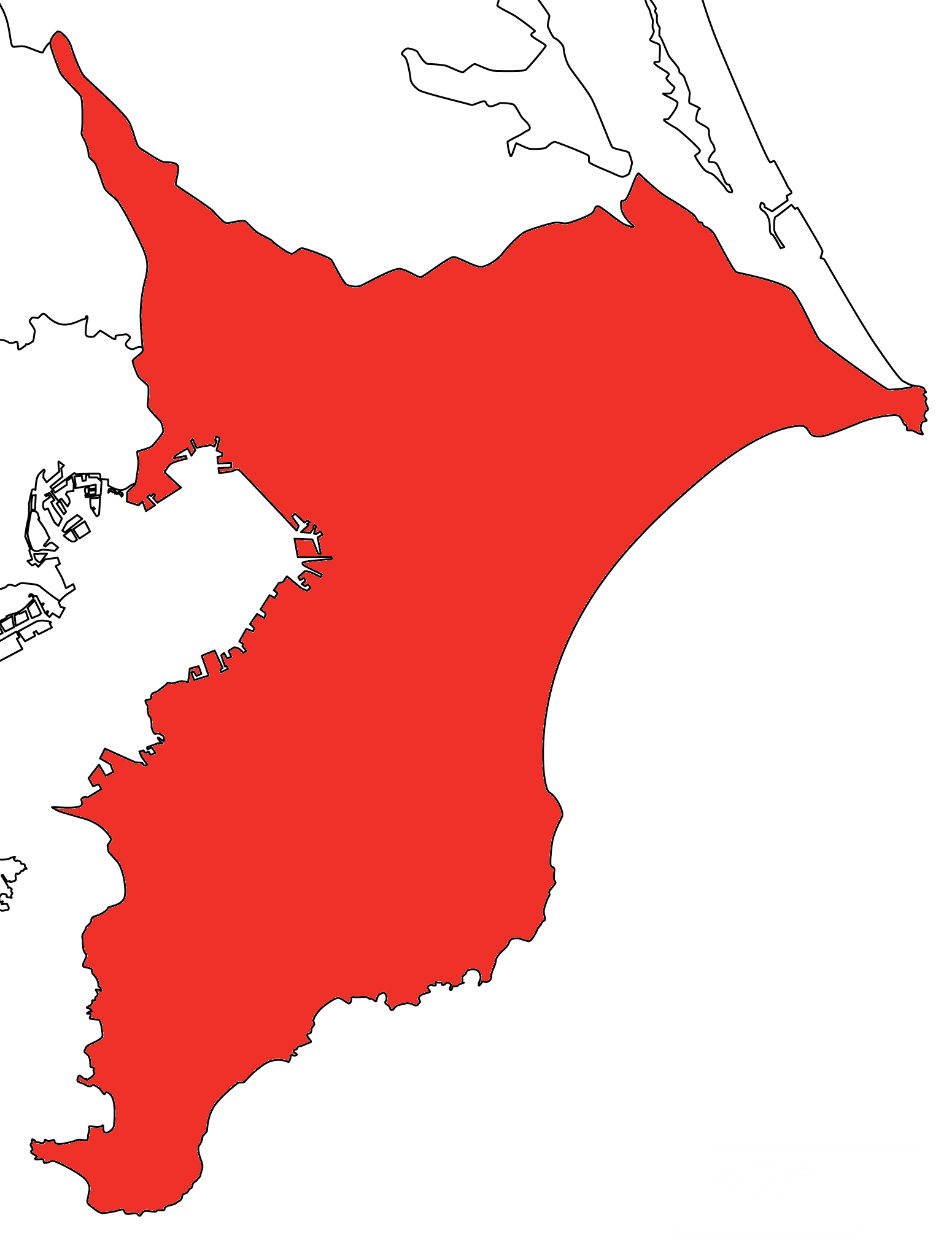 千葉県地図赤塗り